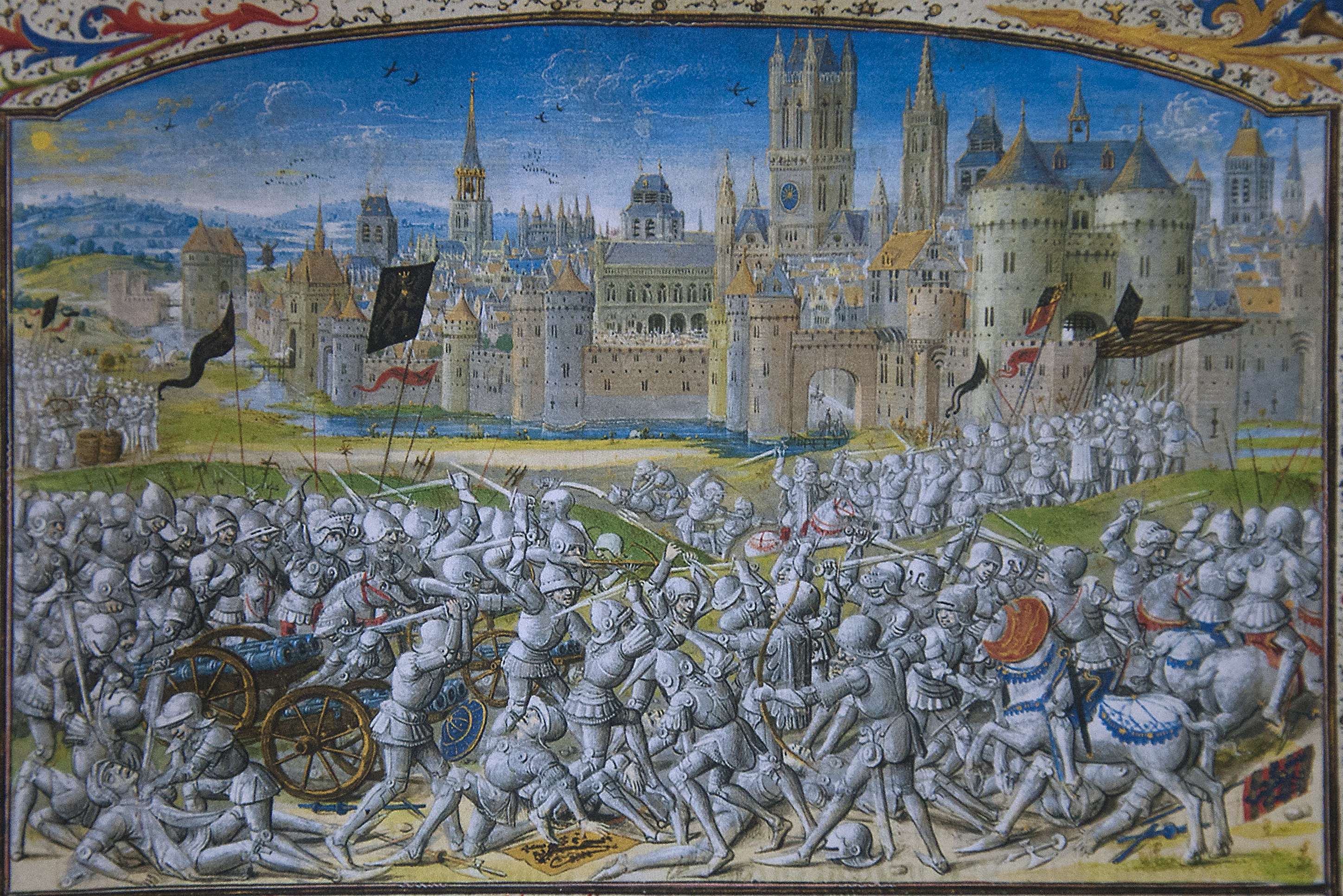 Chroniques de Froissart (15e eeuw) in: Staatsbibliotheek Berlijn - Slag op het Beverhoutsveld